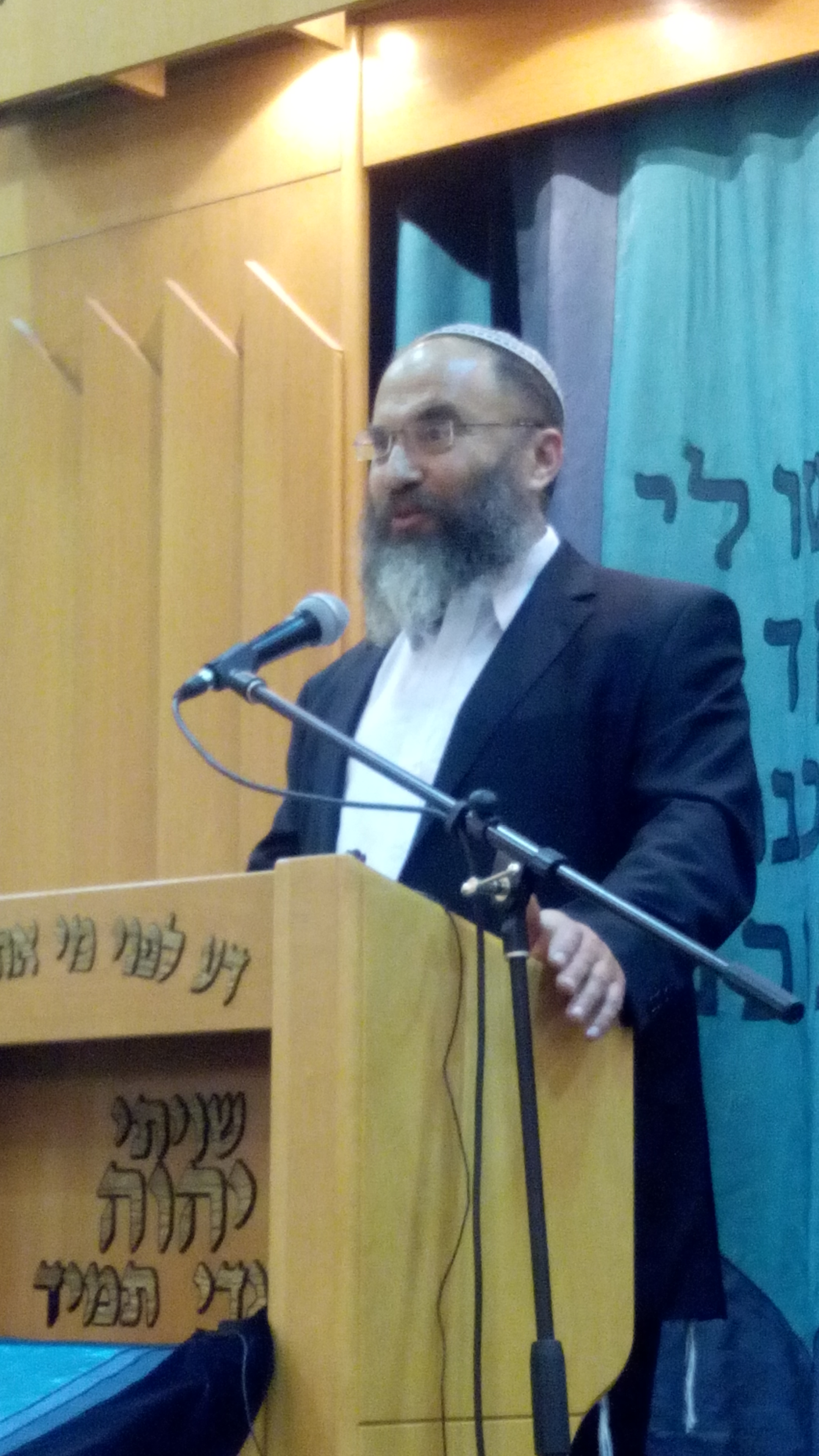 הרב רא"ם נושא דברים בערב ההשקה לשו"ת בדי הארון בגבעת שמואל